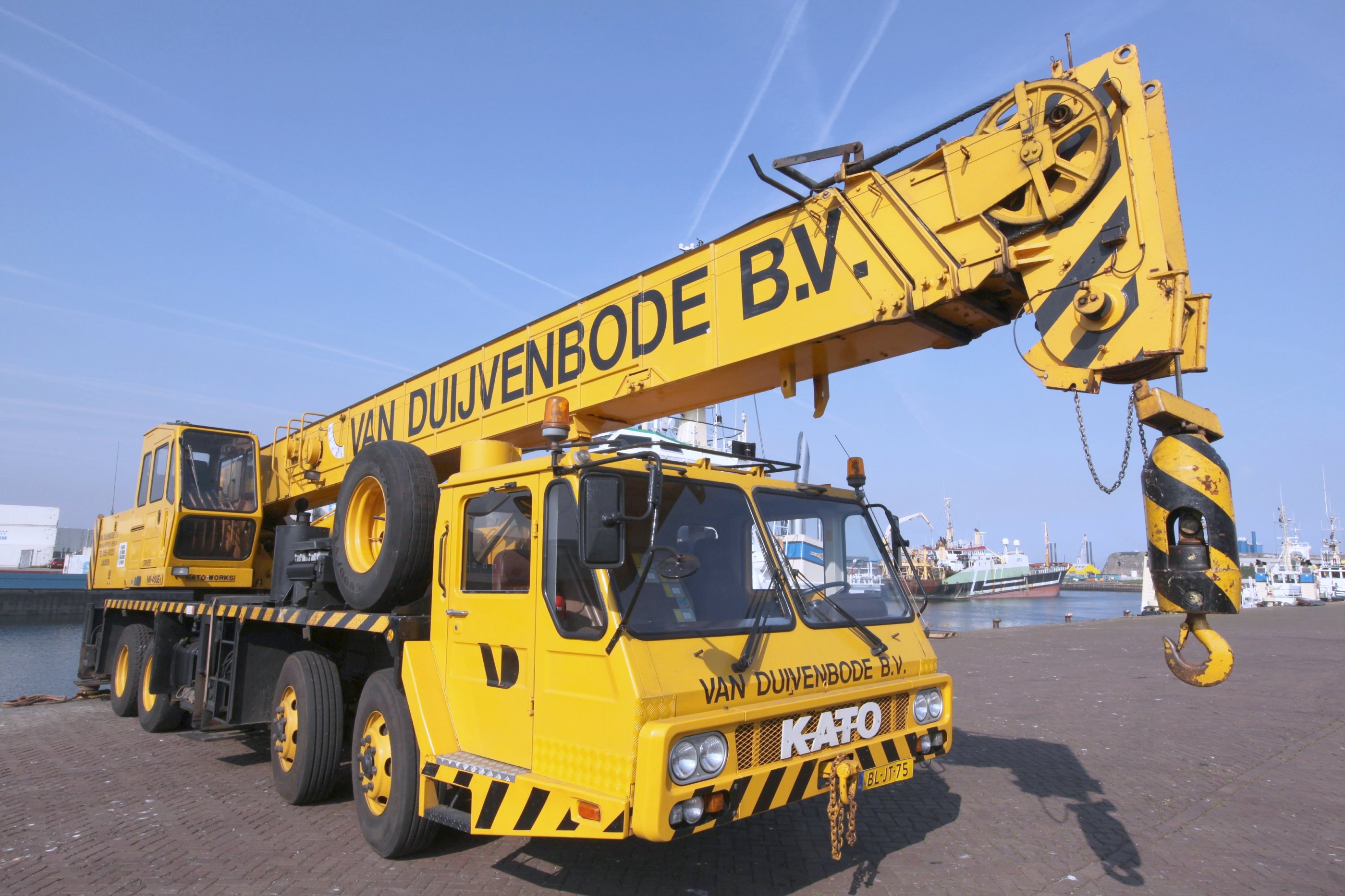 Kato NK 400E van Duijvenbode b.v. IJmuiden.